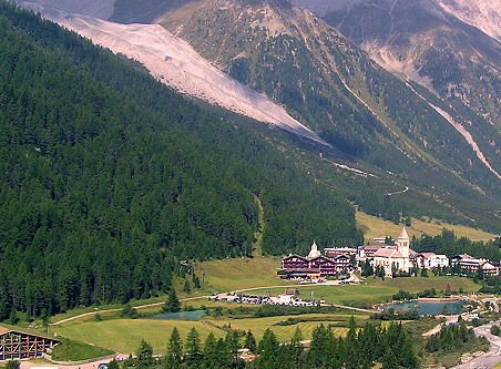 St. Gertraud, Sulden, Ortsteil von Stilfs, dahinter Moräne des Marltferners